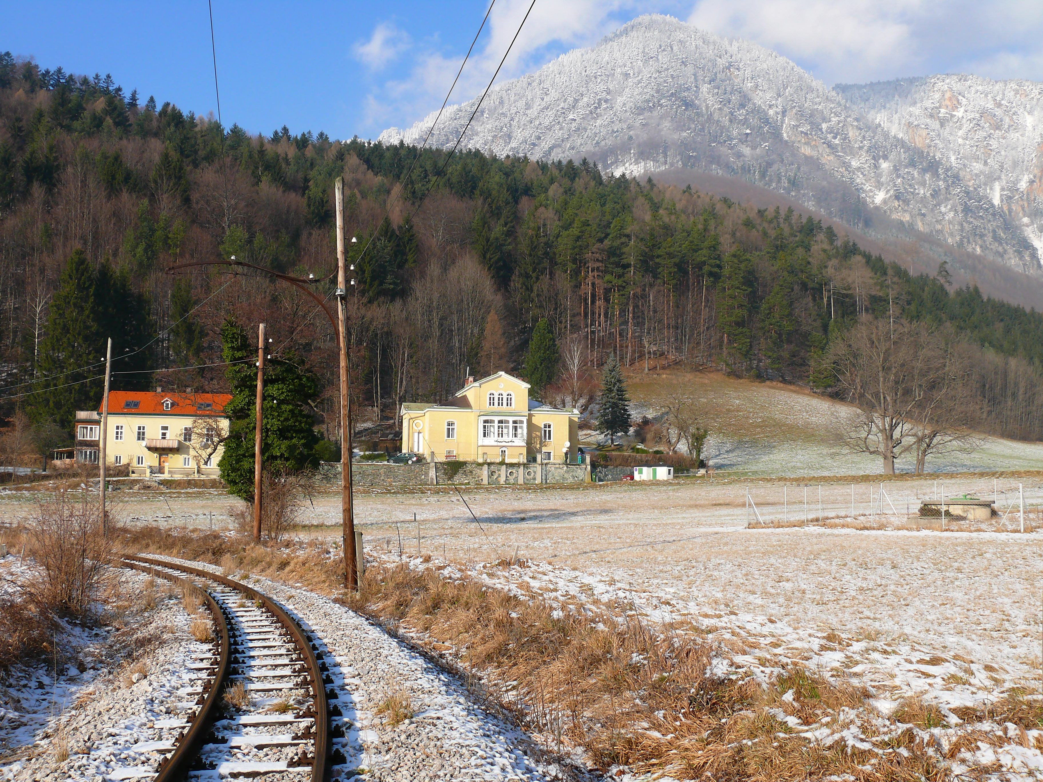 Reichenau Thalhofstr Wintertraum 03